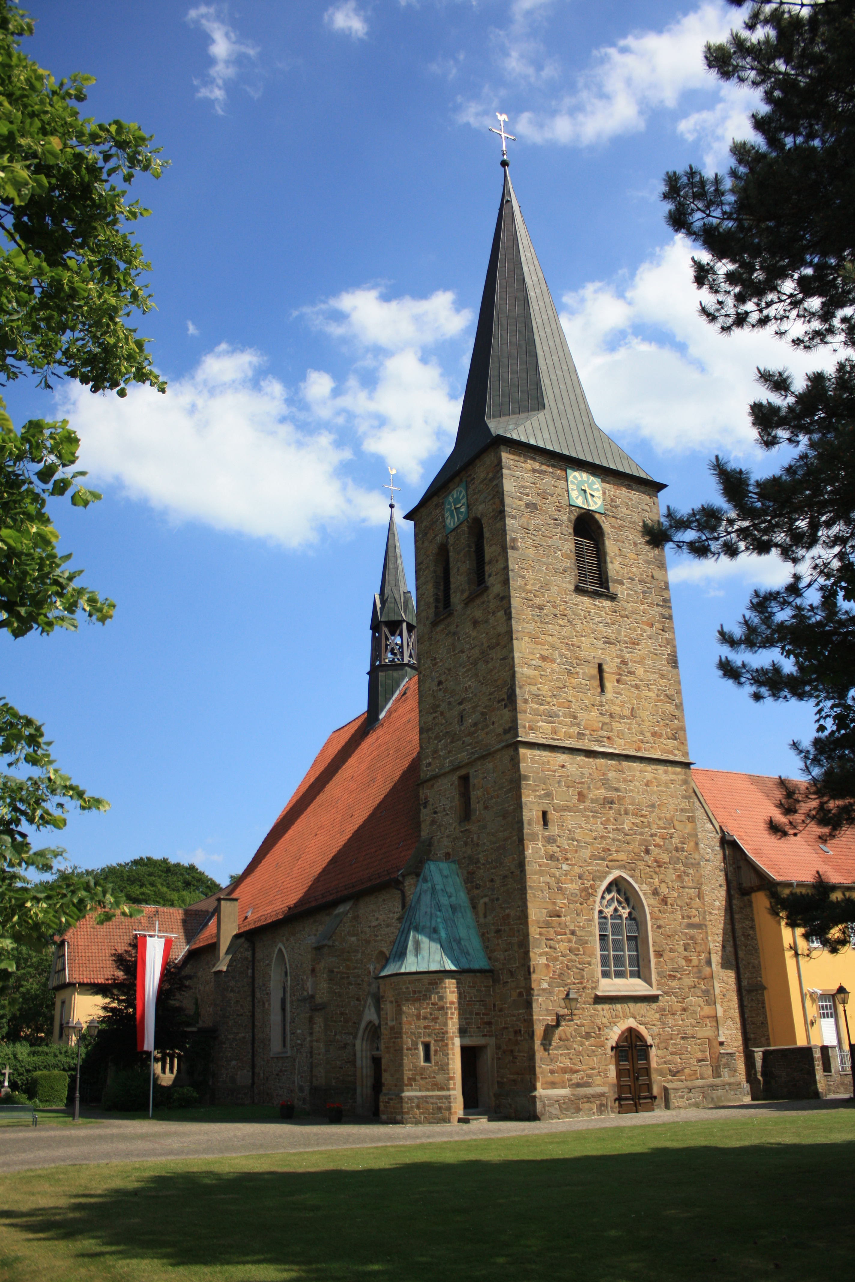 Kirche des Klosters Bersenbrück